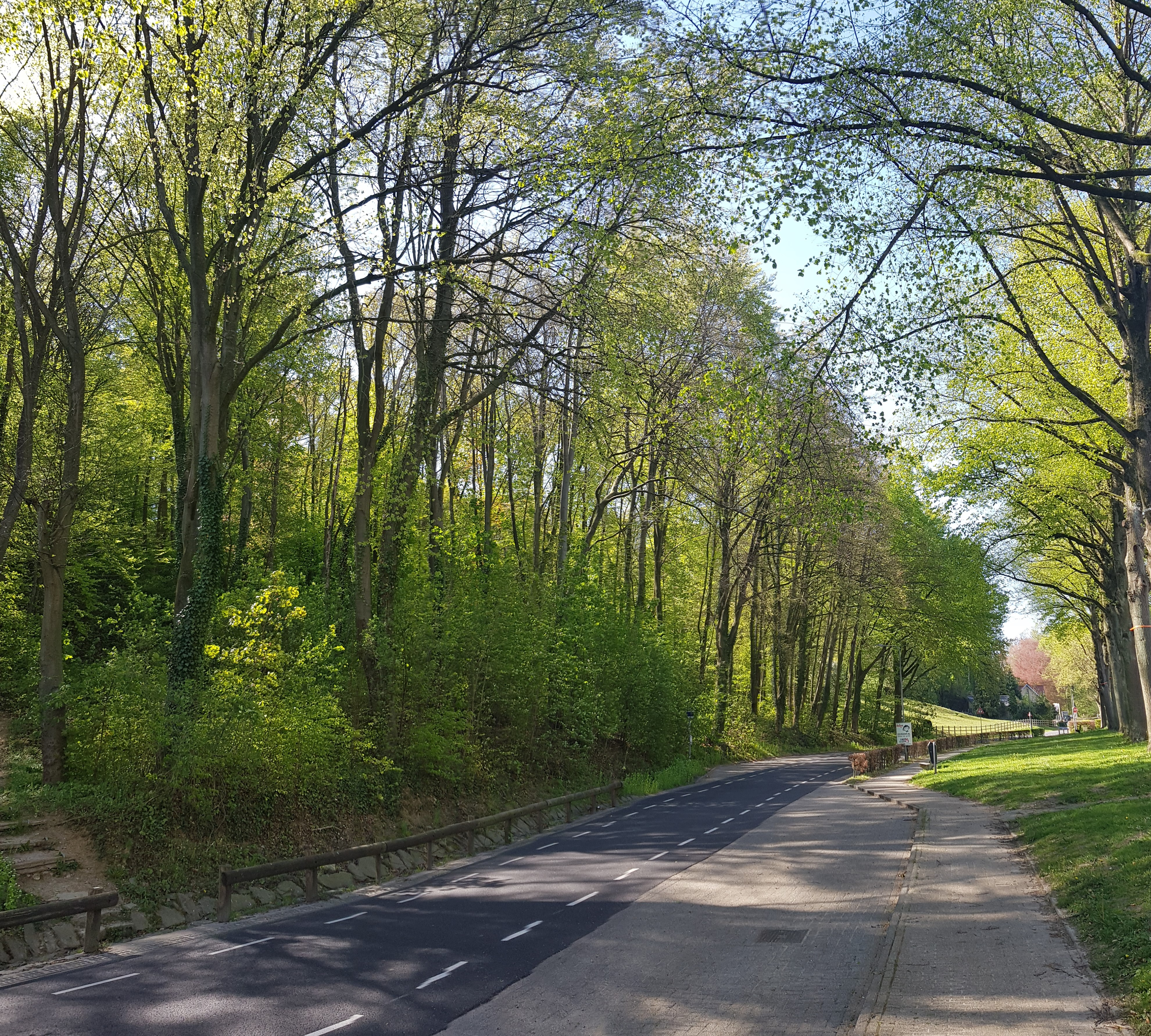 Vogelbos aan de Daalhemerweg, Valkenburg aan de Geul, Nederland